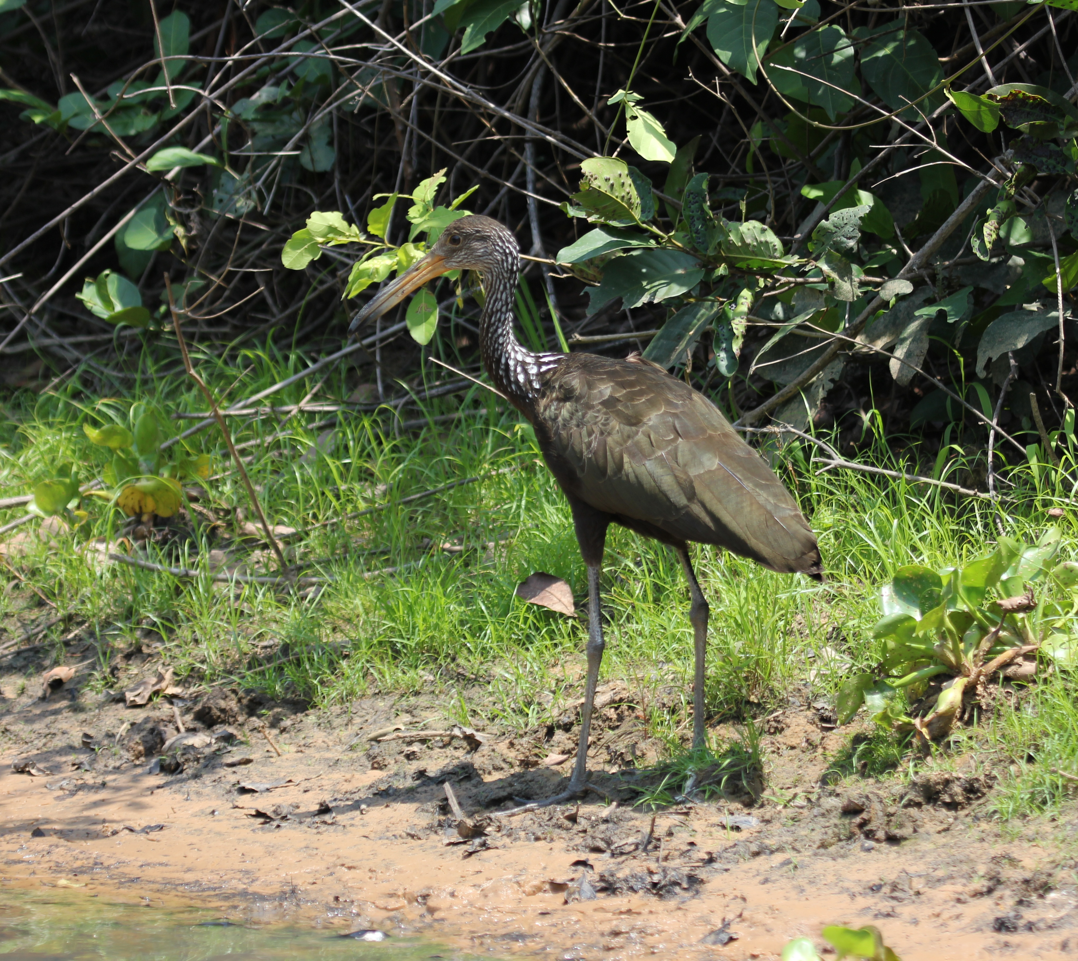 Rallenkranich (Aramus guarauna guarauna) im Pantanal, Brasilien